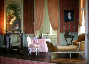 Chambre du château de Condé utilisée par Olympe Mancini (Madame de Soissons)